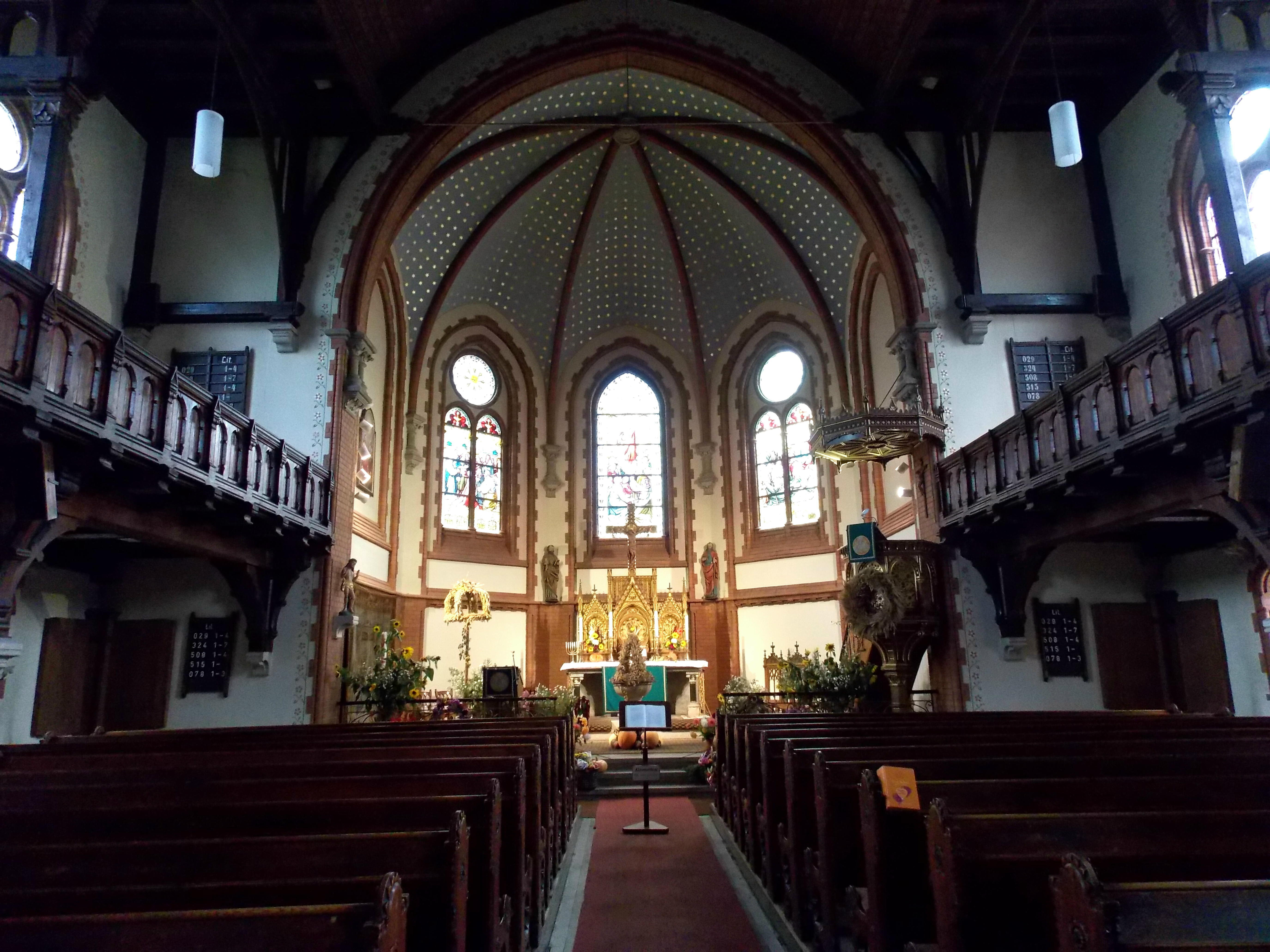 Bad Elster, St. Trinitatiskirche, Innenansicht zum Altarraum